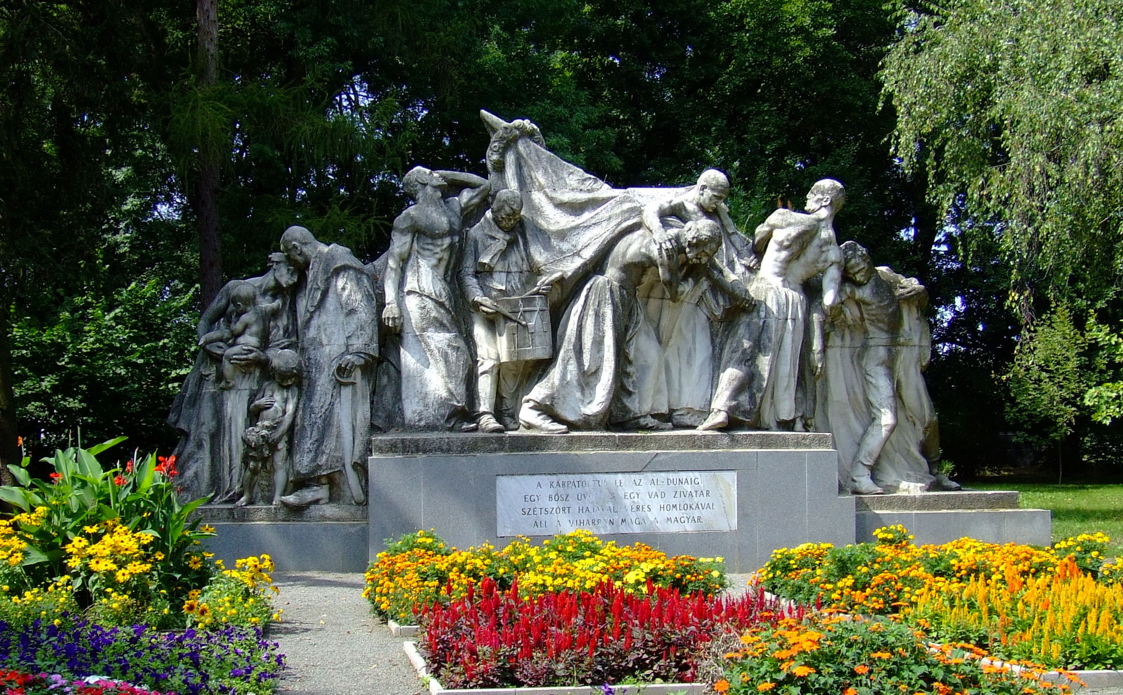 A Kossuth-szoborcsoport Dombóváron. Horvay János alkotása